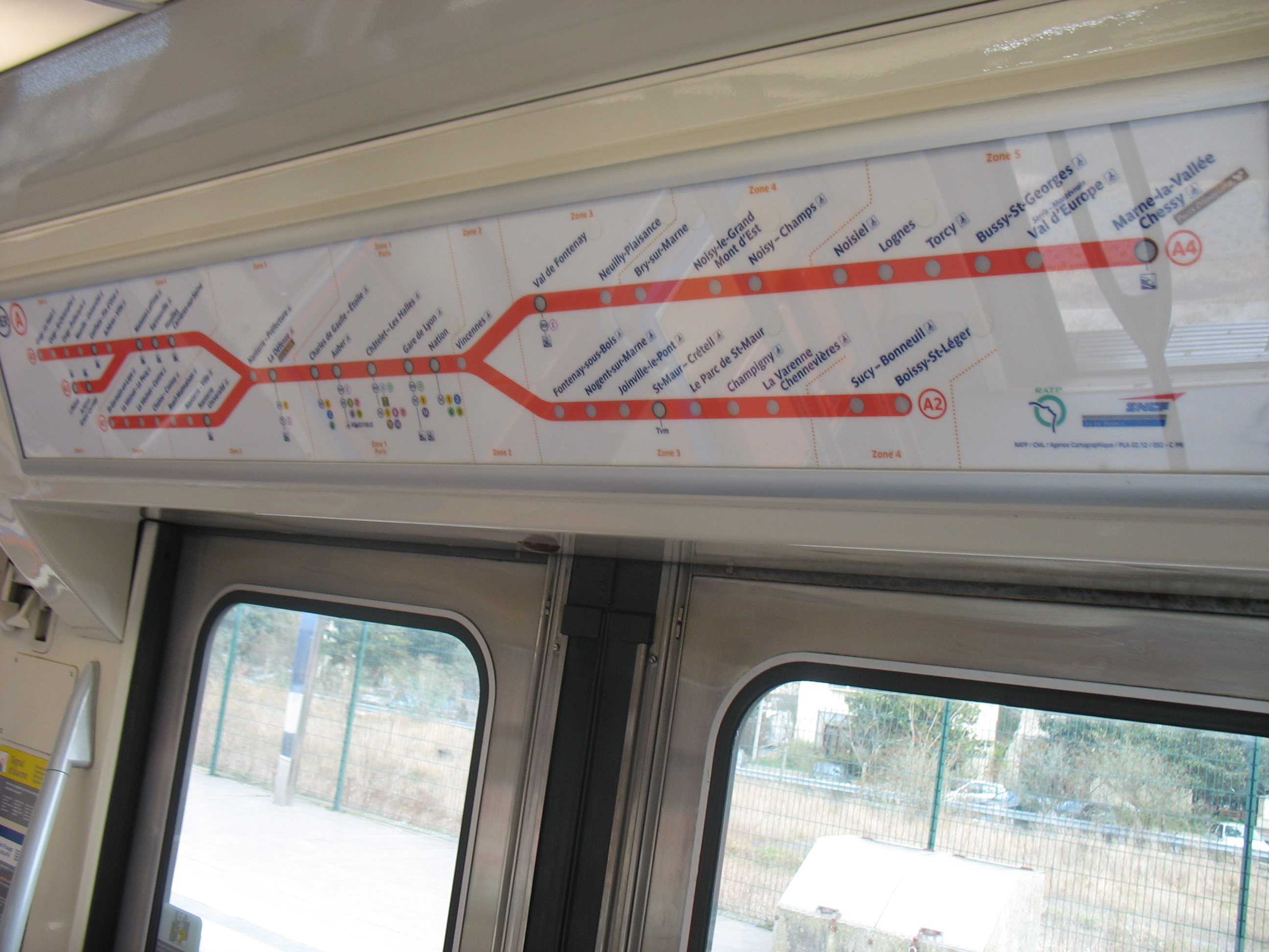 le panneau de ligne dans le MS61 rénové.